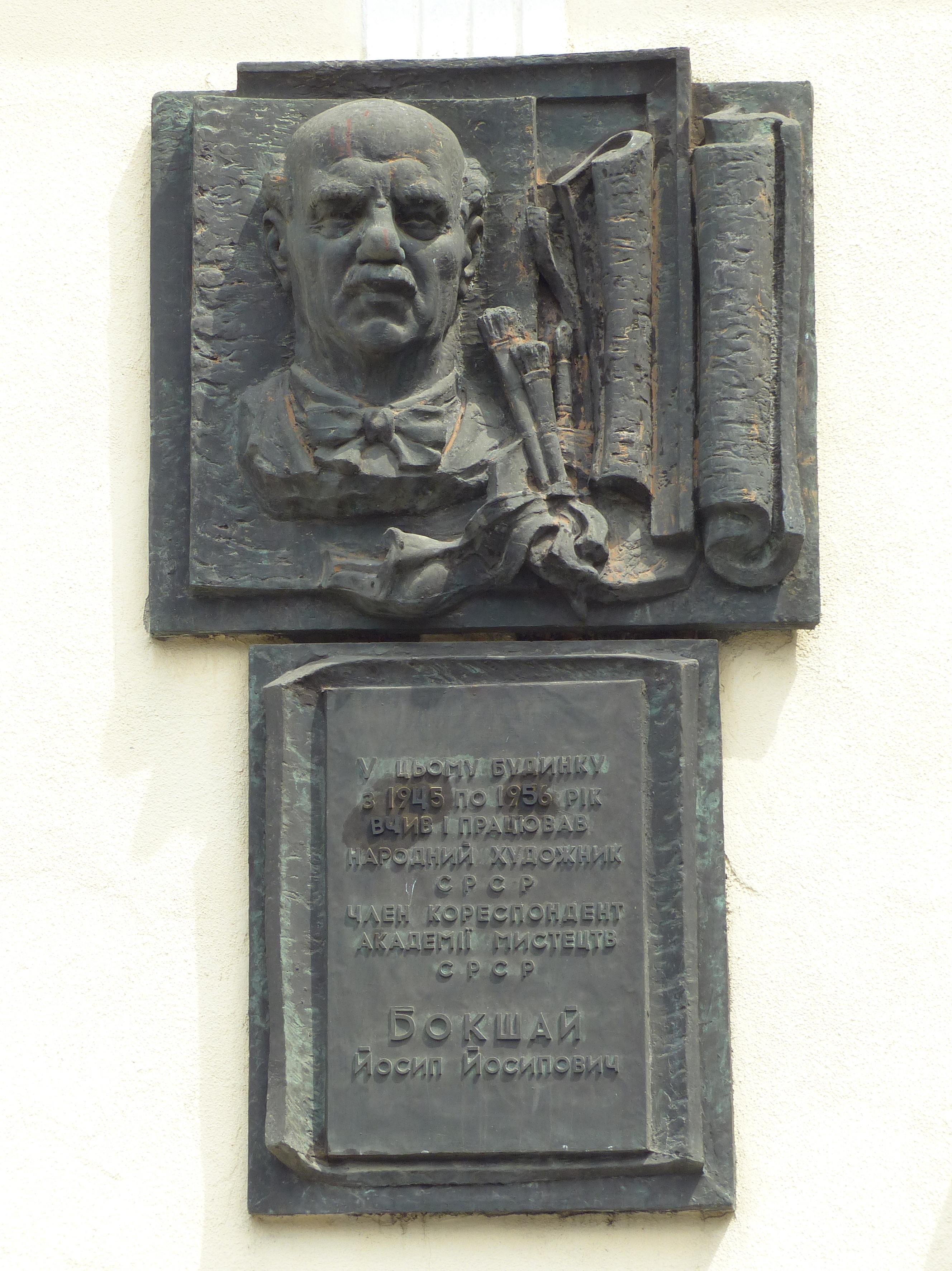 Будинок, в якому жив і працював народний художник СРСР Й.Й. Бошкай, Ужгород, вул. Бокшая, 3